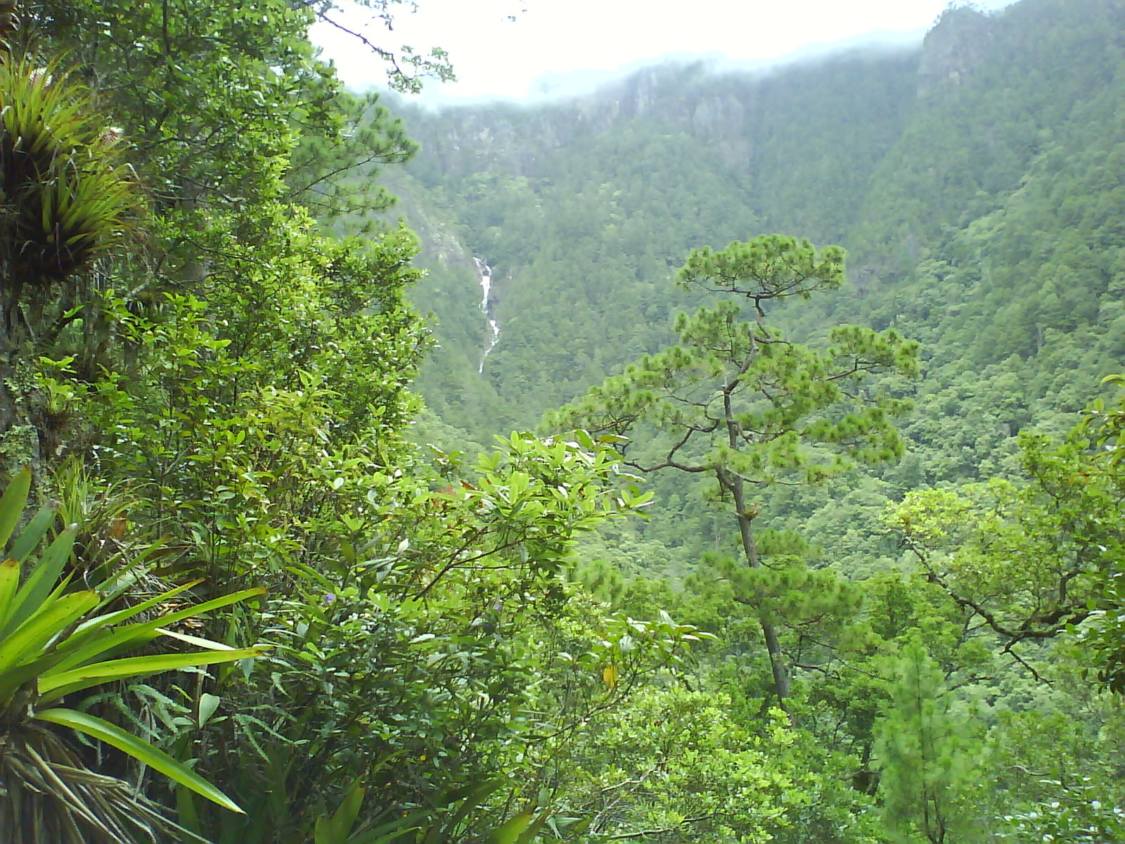 La vista de la Cascada en la Montaña de Celaque